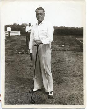 Cyril Tolley, Engels golfer